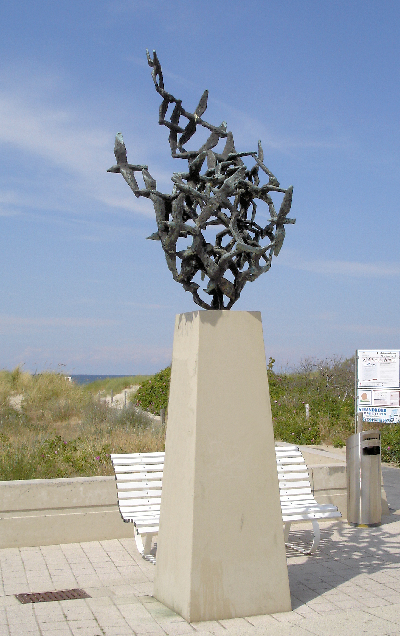 Skulptur „Möwenflug“ von Reinhard Dietrich in Rostock Warnemünde